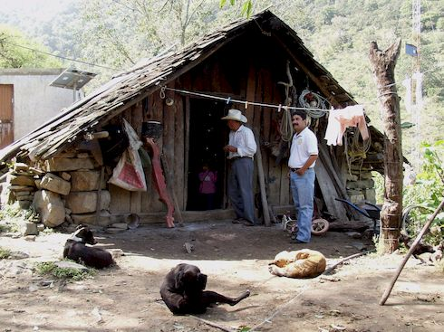 Cocina con Techo de Tabletas - Iturbide, Nuevo León, México